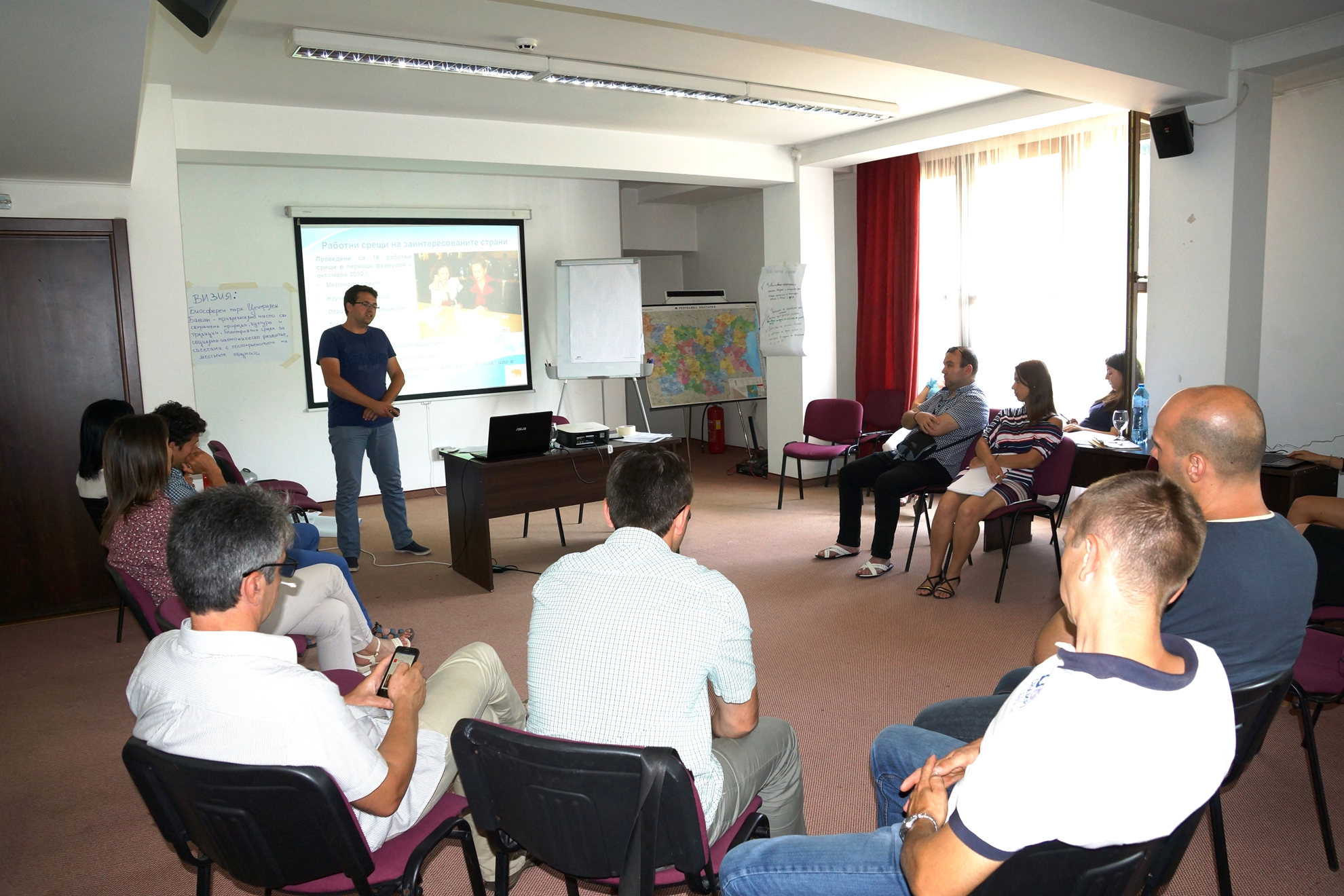 Съвместното управление е ключово за успешното функциониране на биосферните паркове.